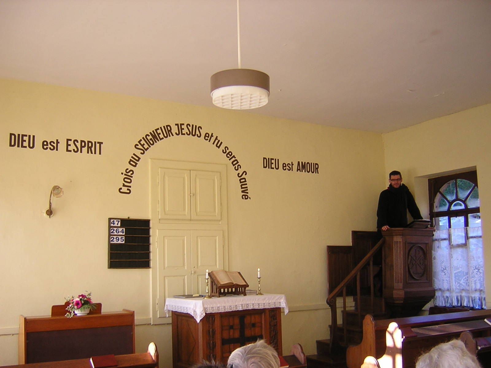 Sur le mur du fond : "Dieu est esprit" - "Crois au Seigneur Jésus et tu seras sauvé" - "Dieu est amour".